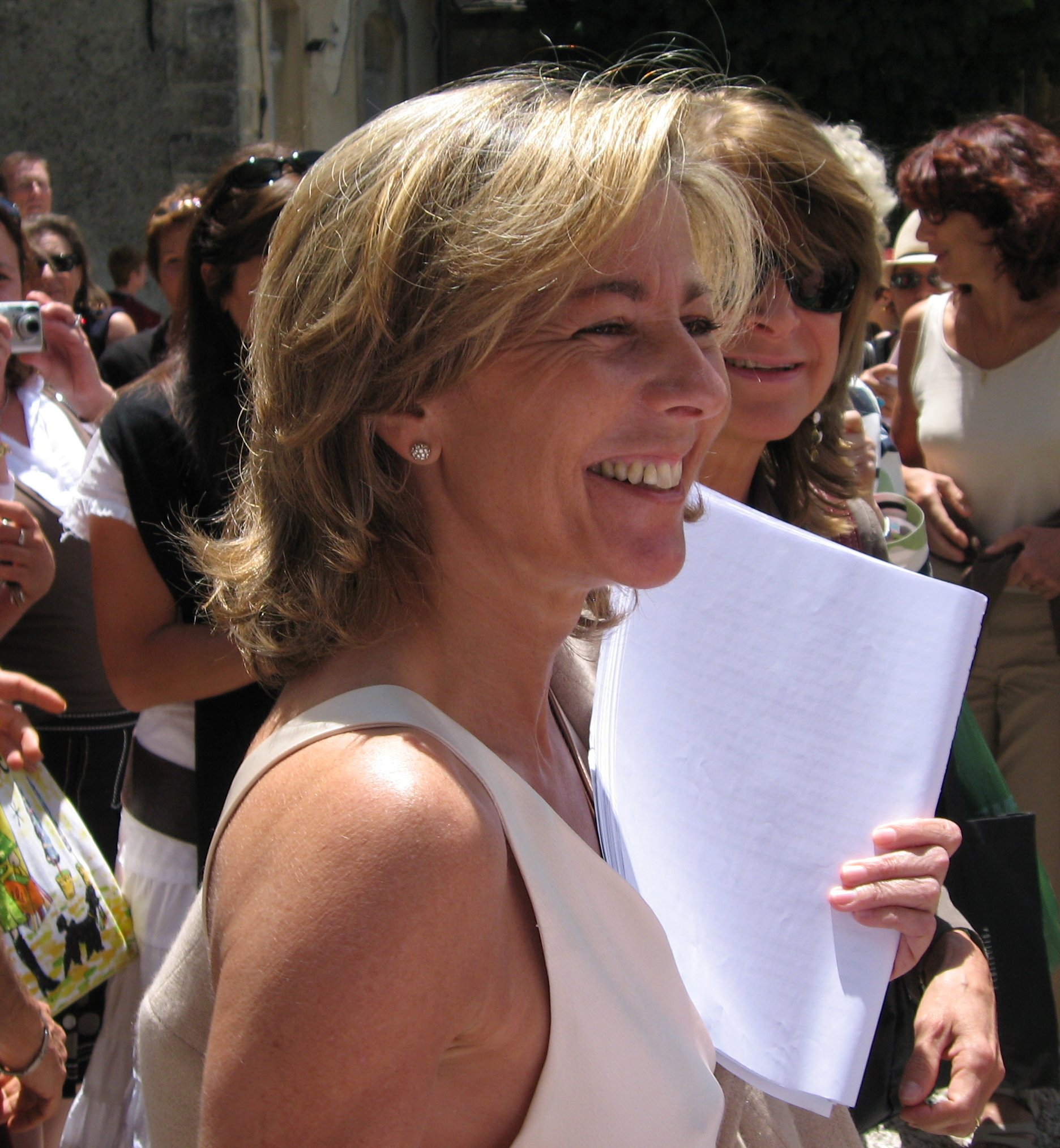 Photographie de Claire Chazal prise à l'issue de sa prestation publique au Festival de la Correspondance de Grignan (Drôme, France) le 5 juillet 2007